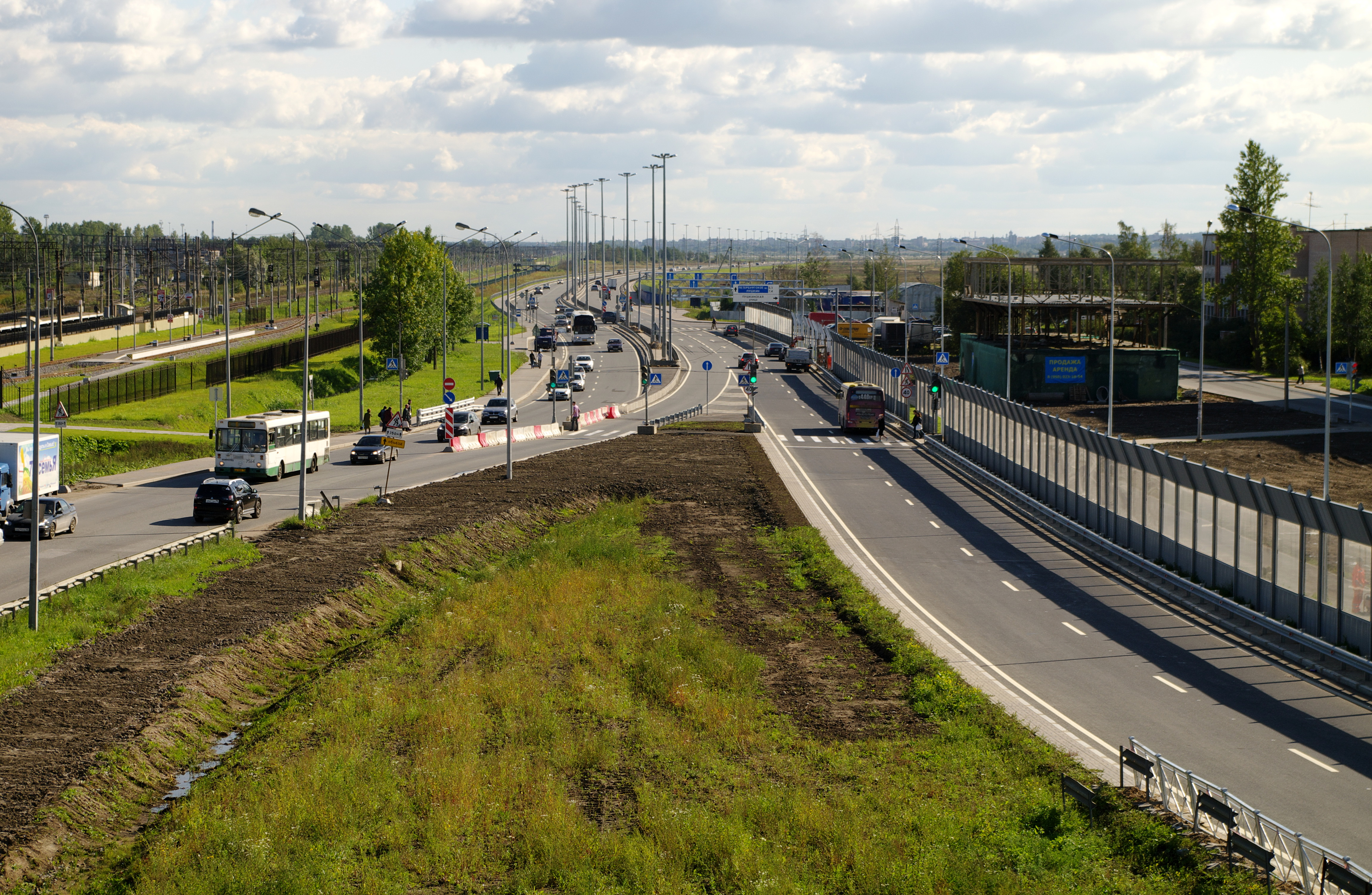 Вновь построенное продолжение Витебского пр. от Шушар (Санкт-Петербург) до Пушкина. Вид с путепровода Московского шоссе над Витебским направлением ОЖД на пересечение с Пушкинской улицей в Шушарах.